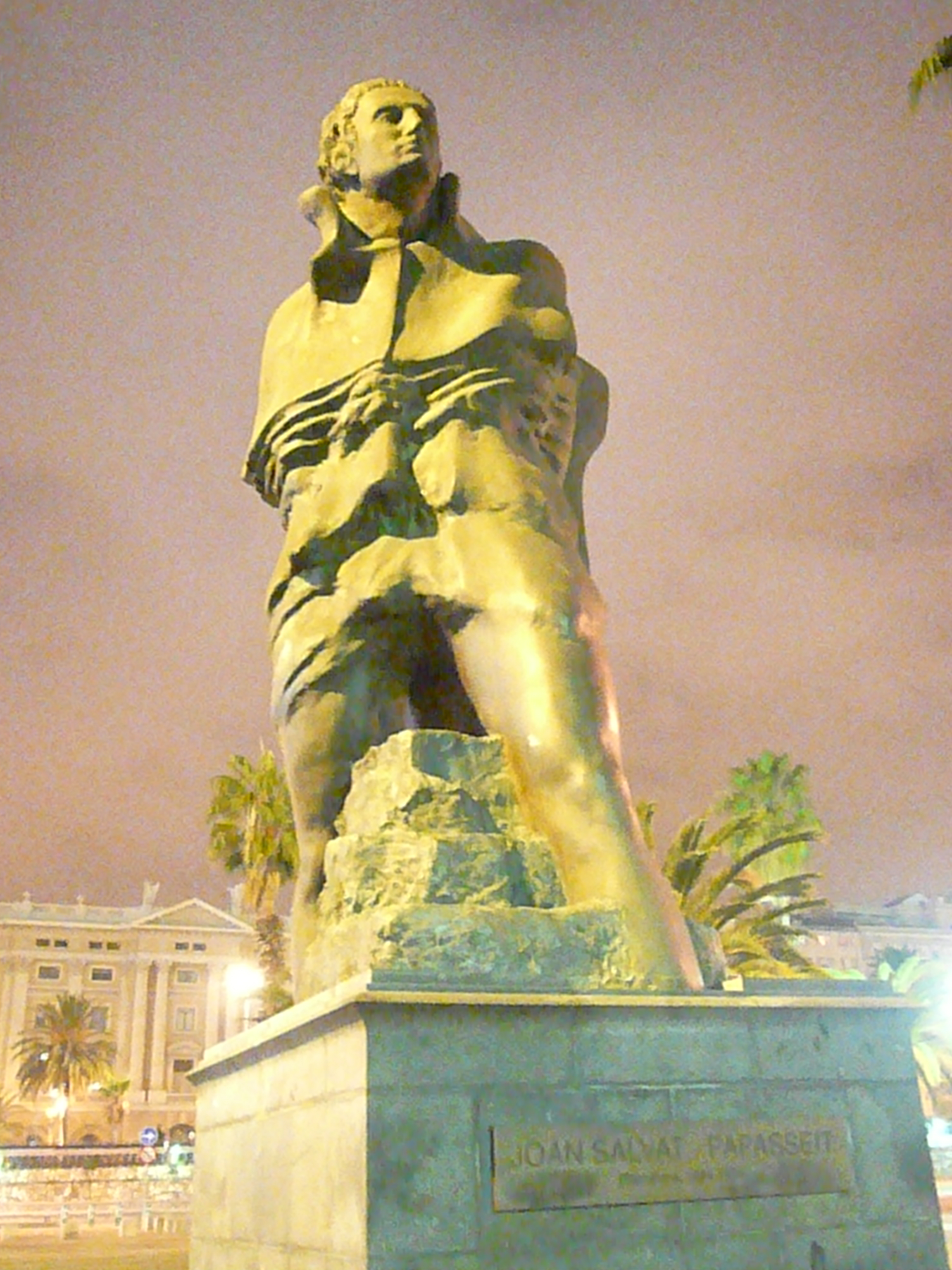 A Joan Salvat Papasseit. Moll de Bosch i Alsina (Barcelona). Escultor: Robert Krier, signadaPedestal: Léon Krier. Material: bronze sobre pedestal de basalt. 1992. 9″ N, 2° 10′ 46.49″ E